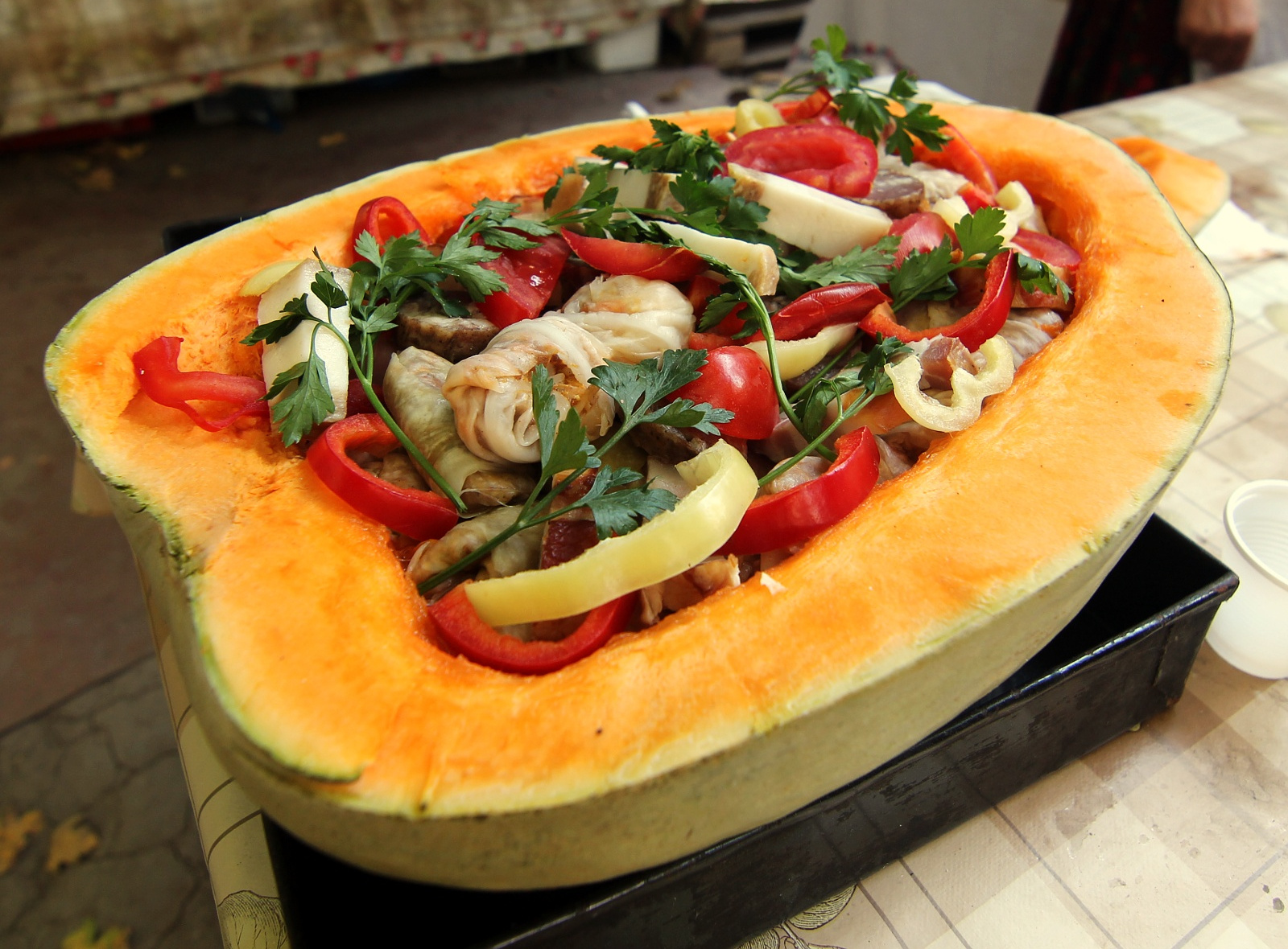 Sarmale în doveac, crude. Urmează a fi puse la cuptor.